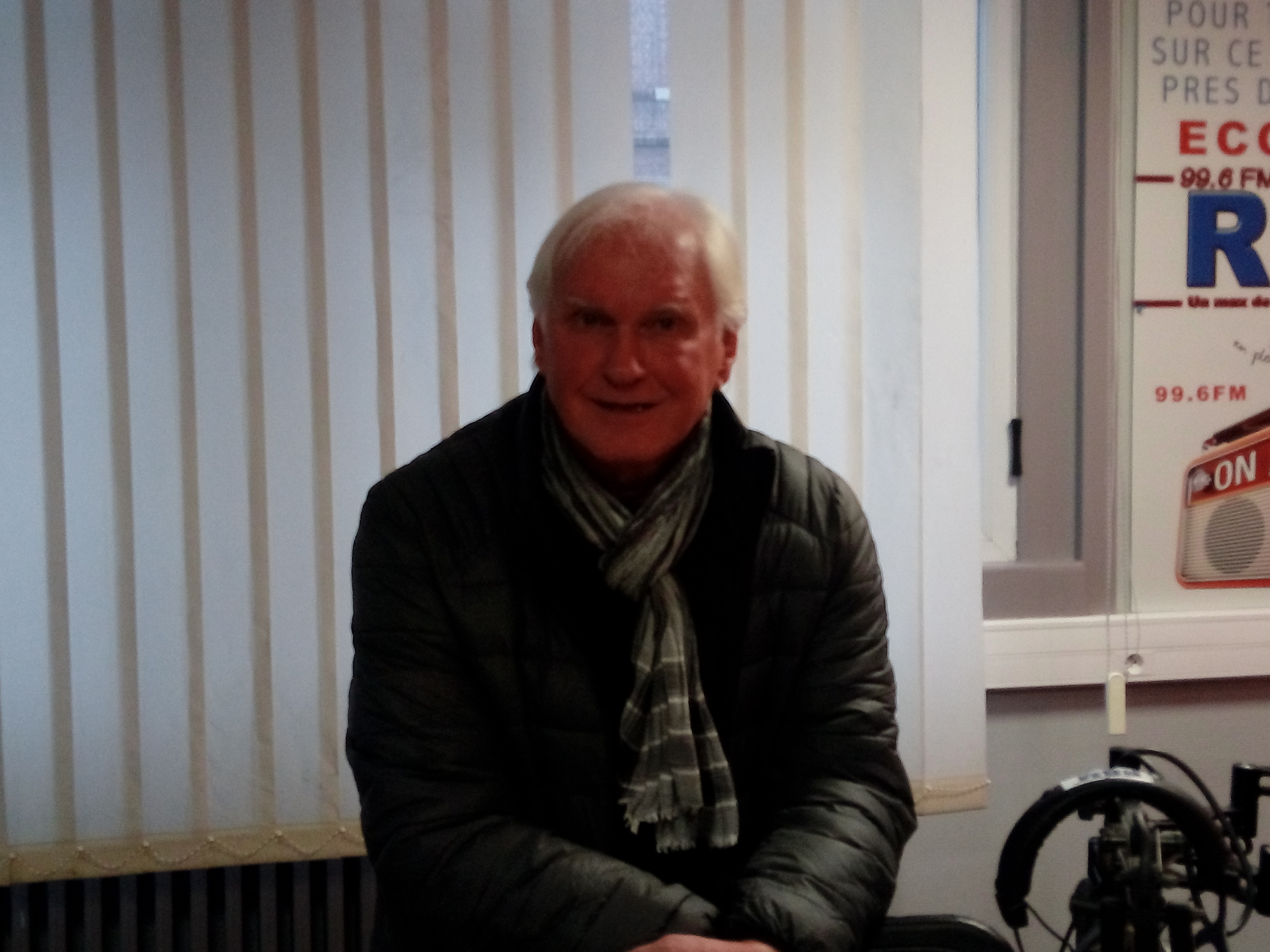 Joachim Marx, lors de l'émission "En Pleine Lucarne" sur la radio RBM 99.6 FM, le 7 janvier 2017.